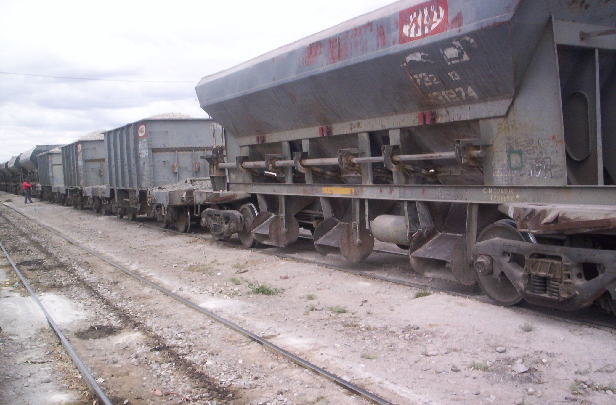 Vista del tren que transporta minerles en la estación de Cañada Honda, departamento Sarmiento, provincia de San Juan, Argentina